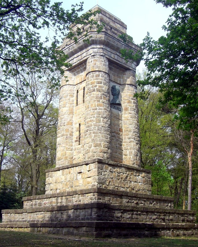 Bismarckturm (bzw. -säule) in Viersen. Selbst fotografiert.